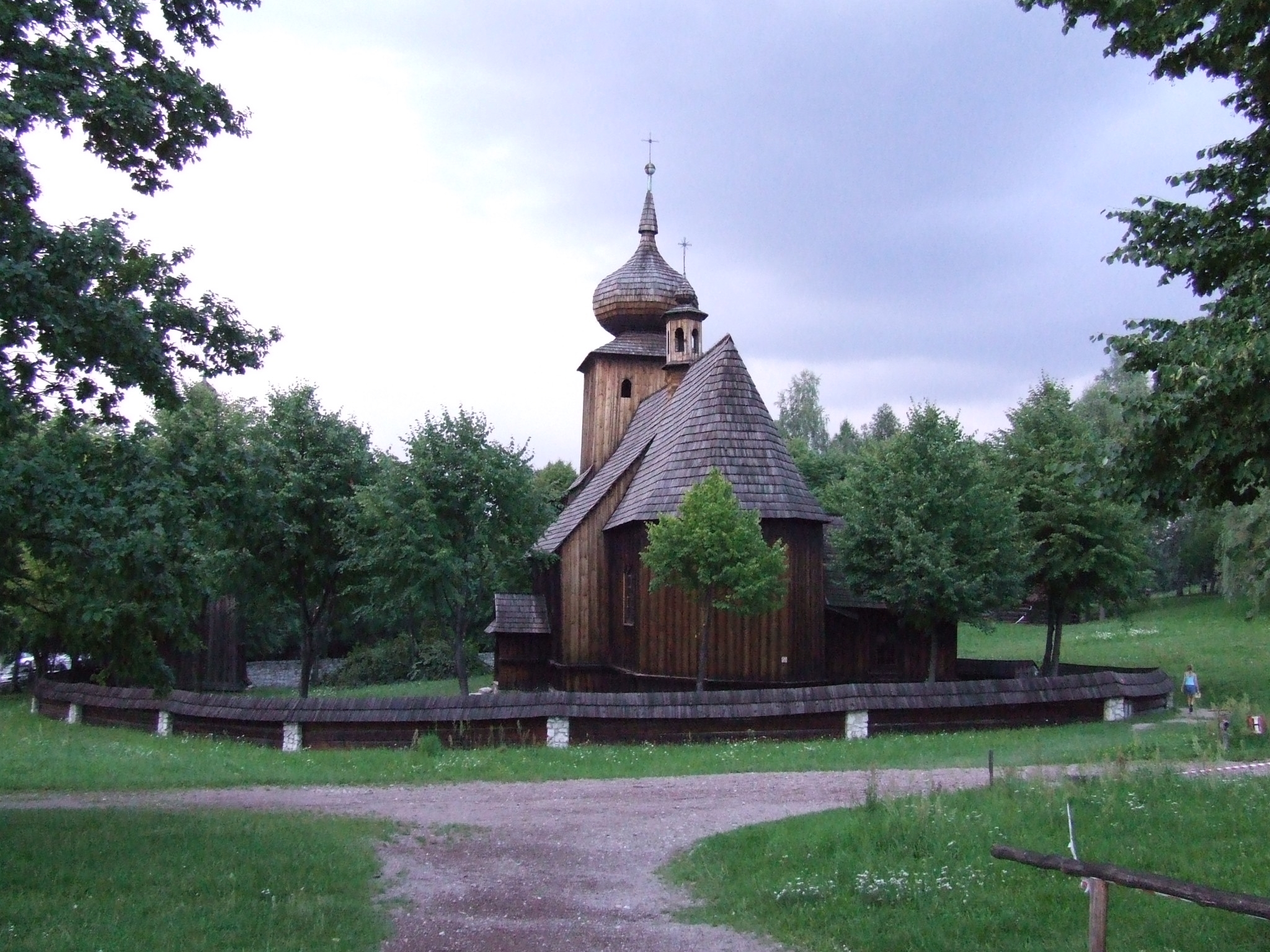 Wygiełzów - skansen, kościół z Ryczowa